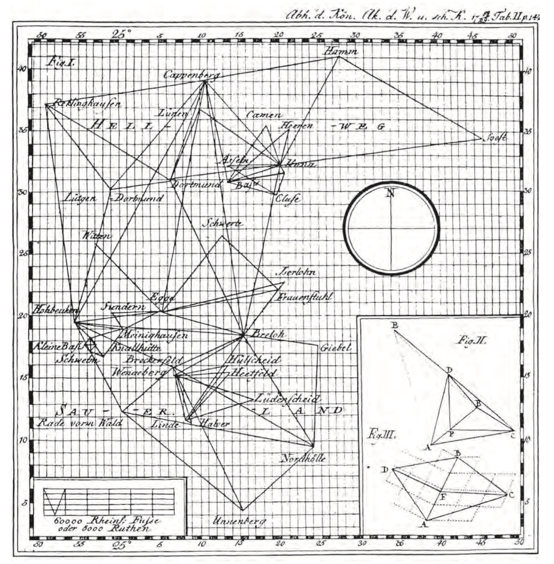 Triangulation der gesamten Grafschaft Mark, 38 Punkte, nach heutiger Bewertung auf 40 m genau.